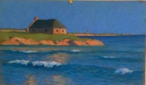 Louis William Graux (1889-1962) - Moulin à marée, Morbihan, 40 x 25 cm, coll. particulière